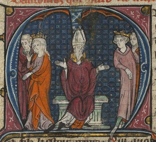 Répudiation d'Agnès de Courtenay